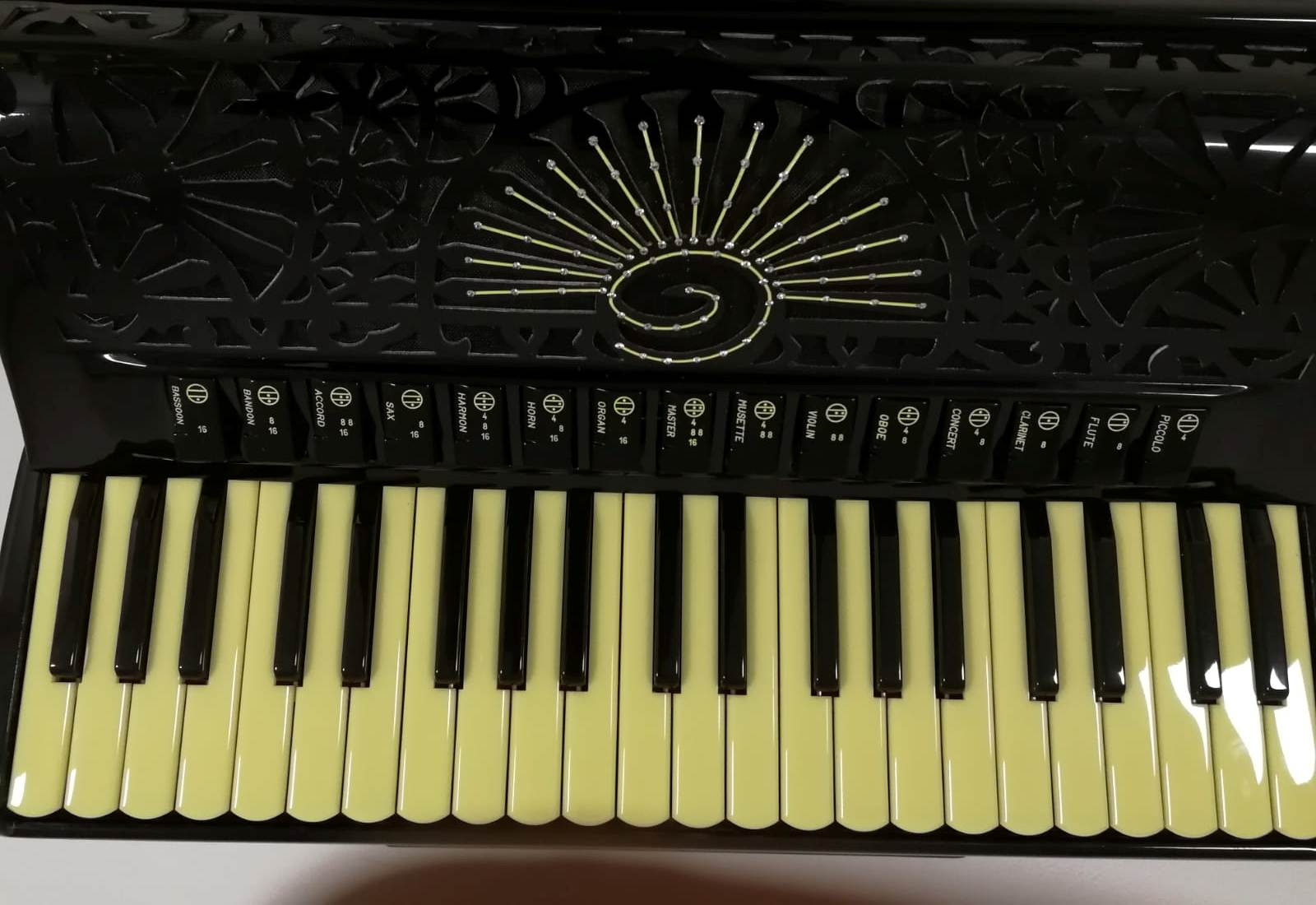 Nomes dos registros em um acordeon com 15 registros